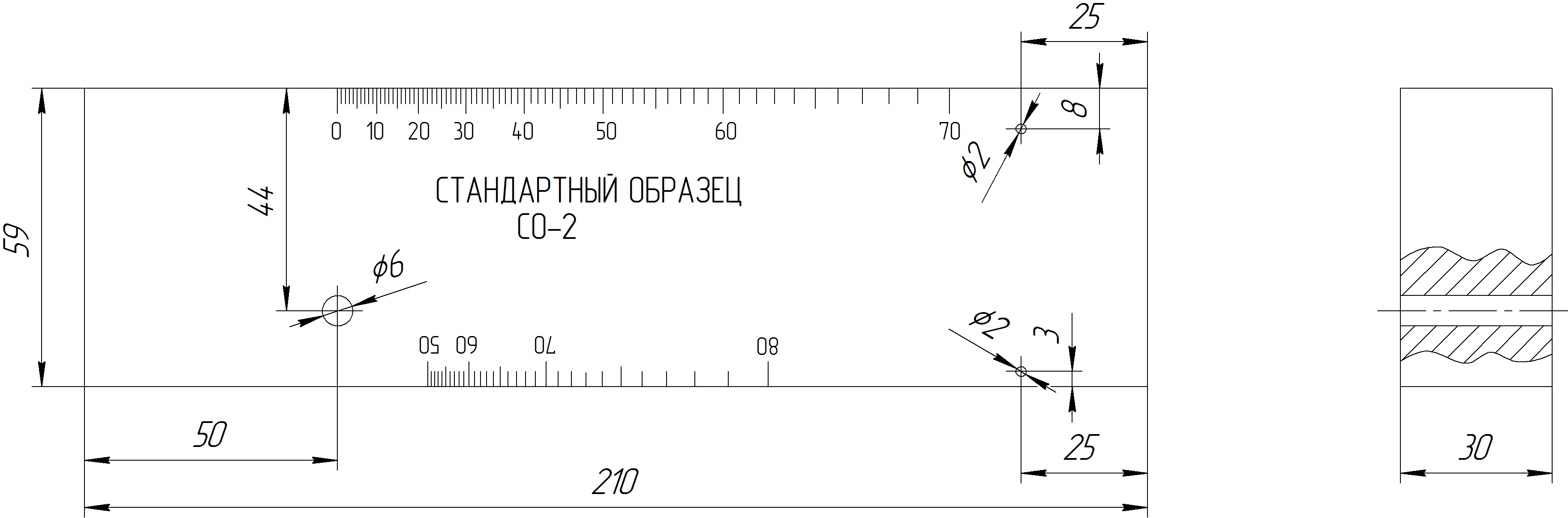 Чертеж стандартного образца СО-2